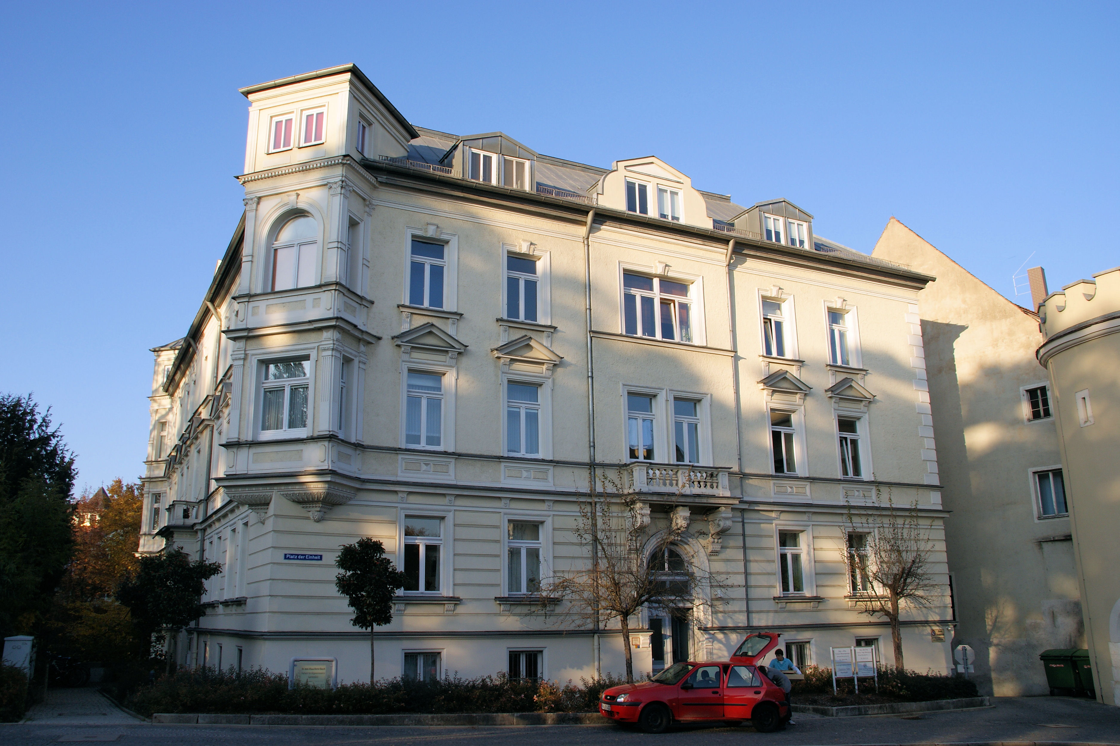 Doppelmietshaus, viergeschossiger und gestelzter Mansardwalmdachbau in Ecklage mit Mittelrisaliten, Eckerkern, Balkon, Fassadengliederungen in Haustein, Neurenaissance, Südteil 1884, Nordteil 1889, von G. F. Hildenbrand This is a photograph of an architectural monument.